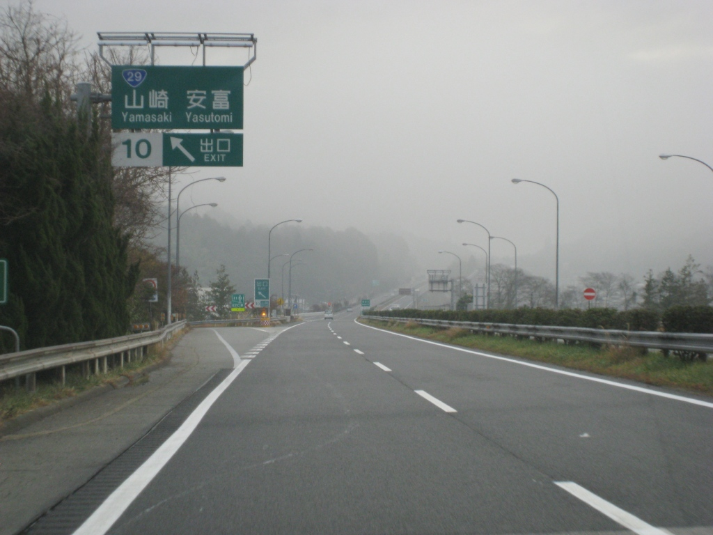 山崎インターチェンジの案内板